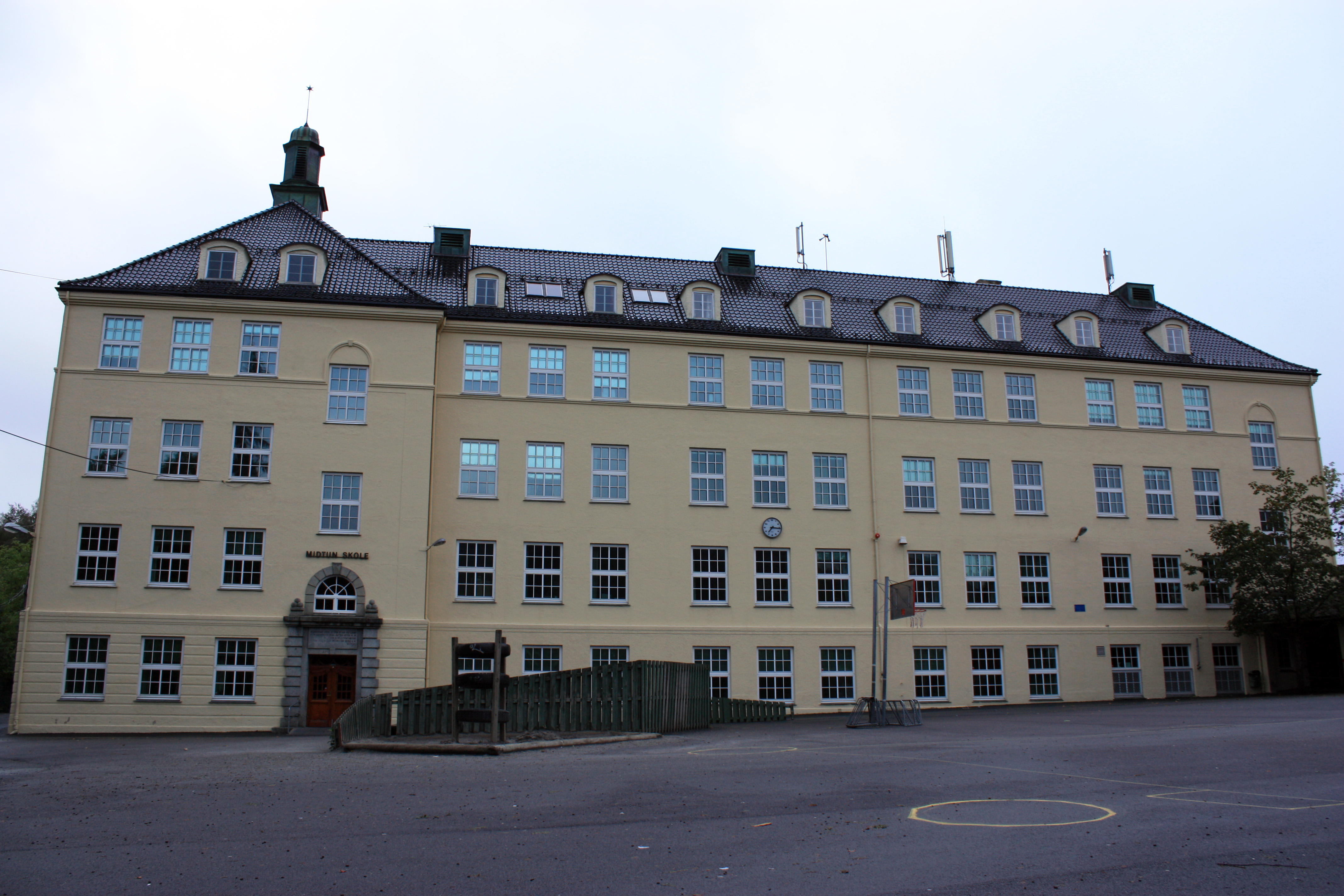 Midtun skole, Fana, Bergen.